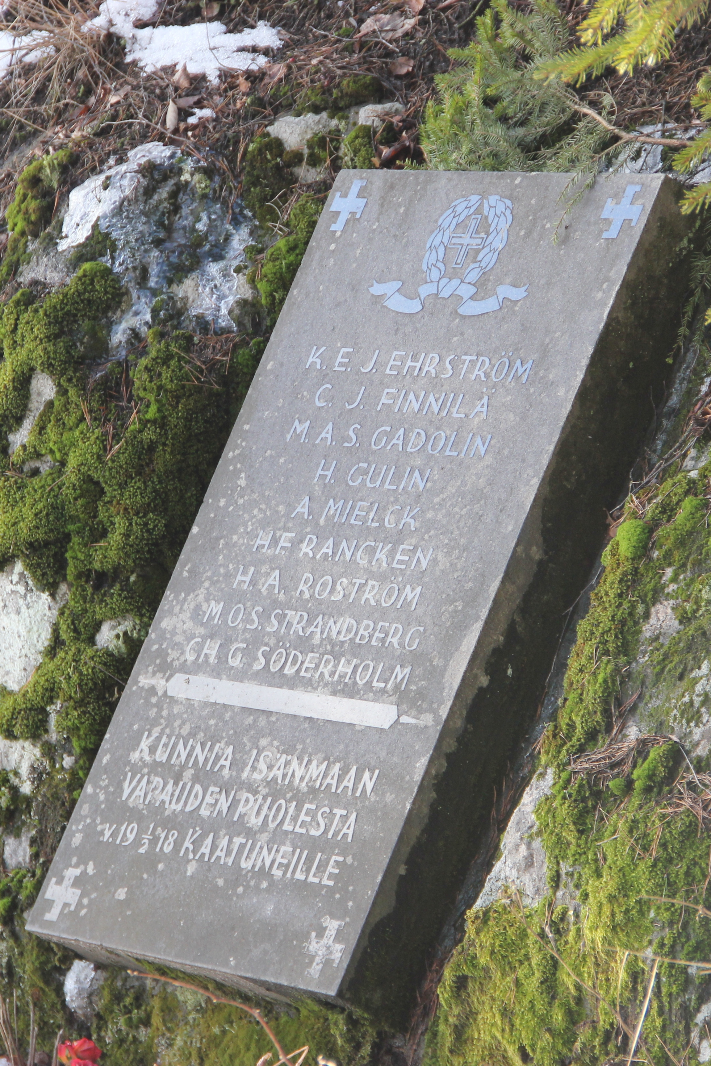 Holger Ranckenin ryhmä, Vihdin teloitukset 1. helmikuuta 1918. Muistolaatta Porintien varressa lähellä Vihdin kirkonkylää.